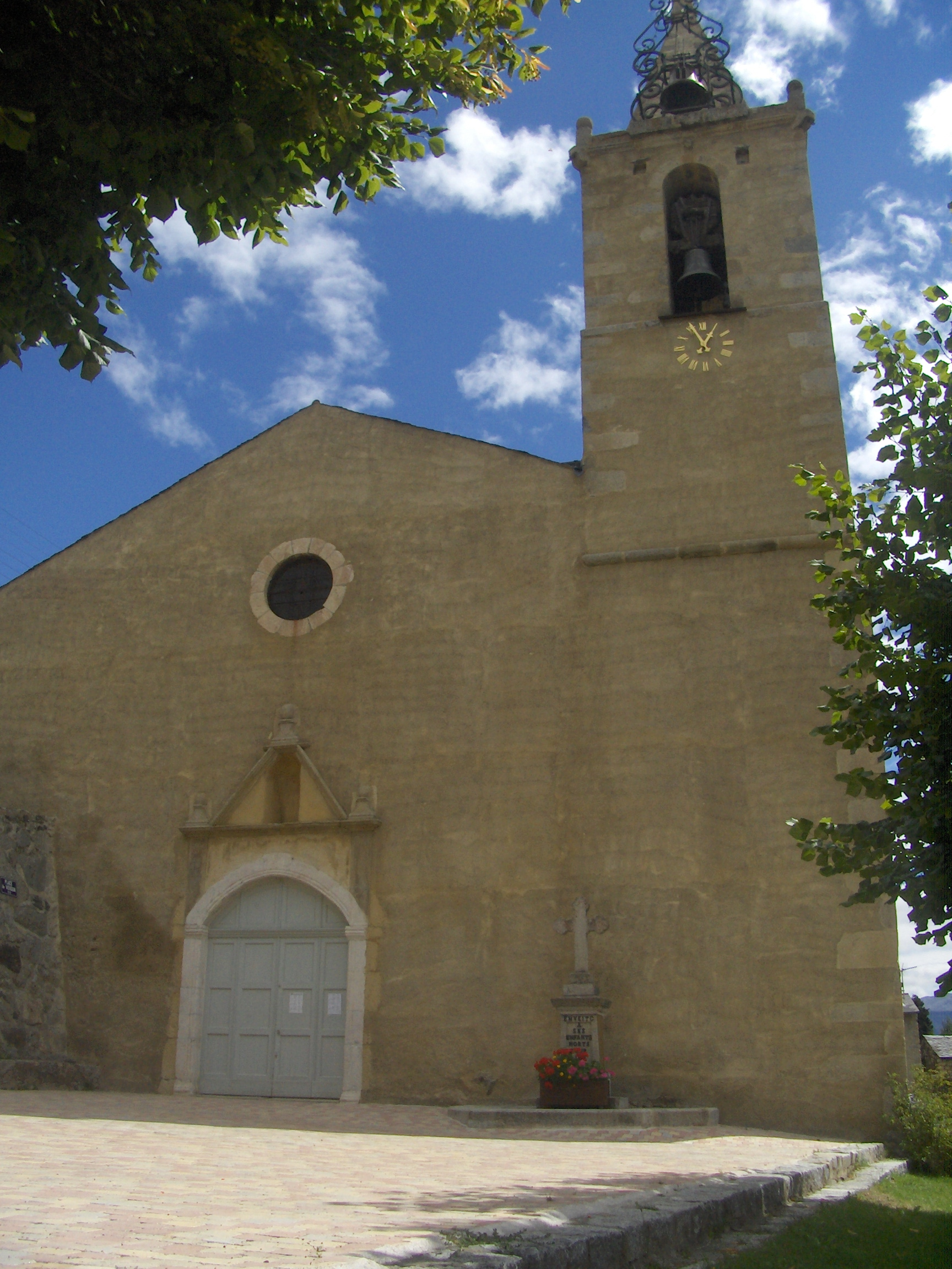 Sant Sadurní d'Enveig (Alta Cerdanya) .